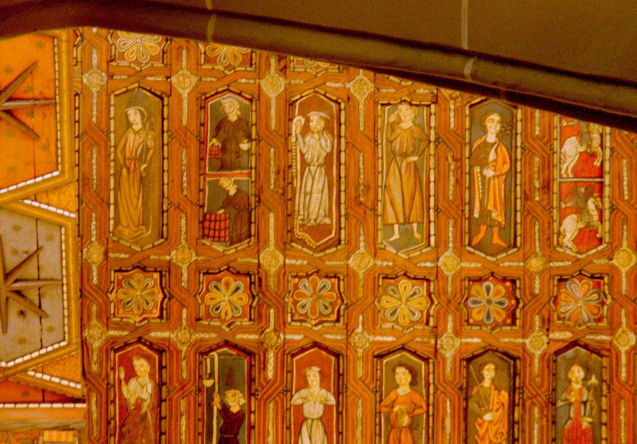 Catedral de Santa María de Mediavilla, Teruel. Techumbre mudéjar